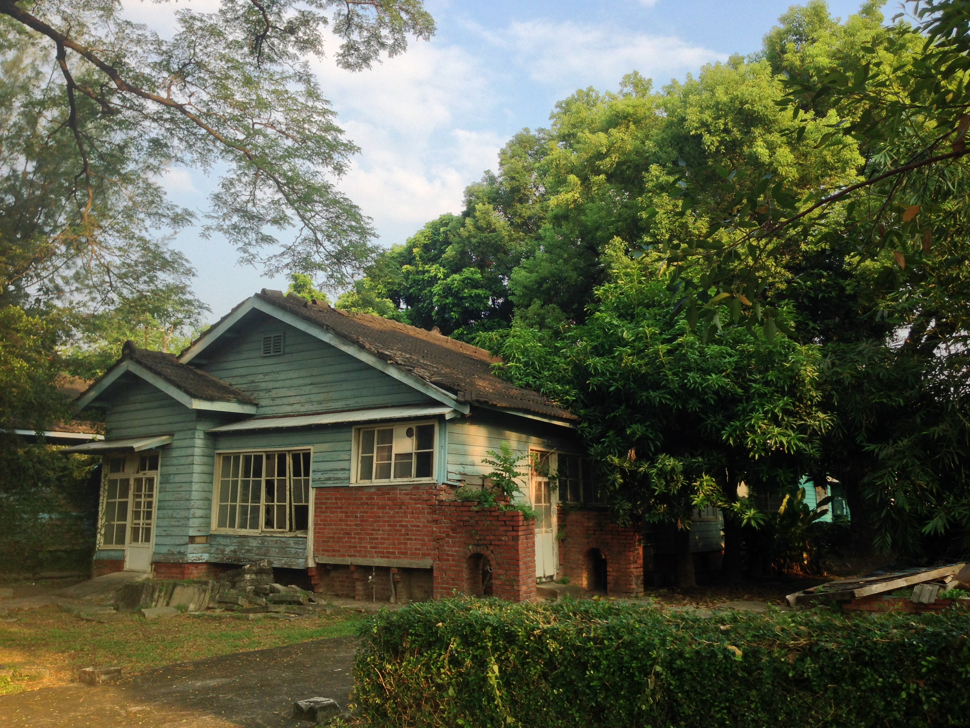 中油宏南宿舍